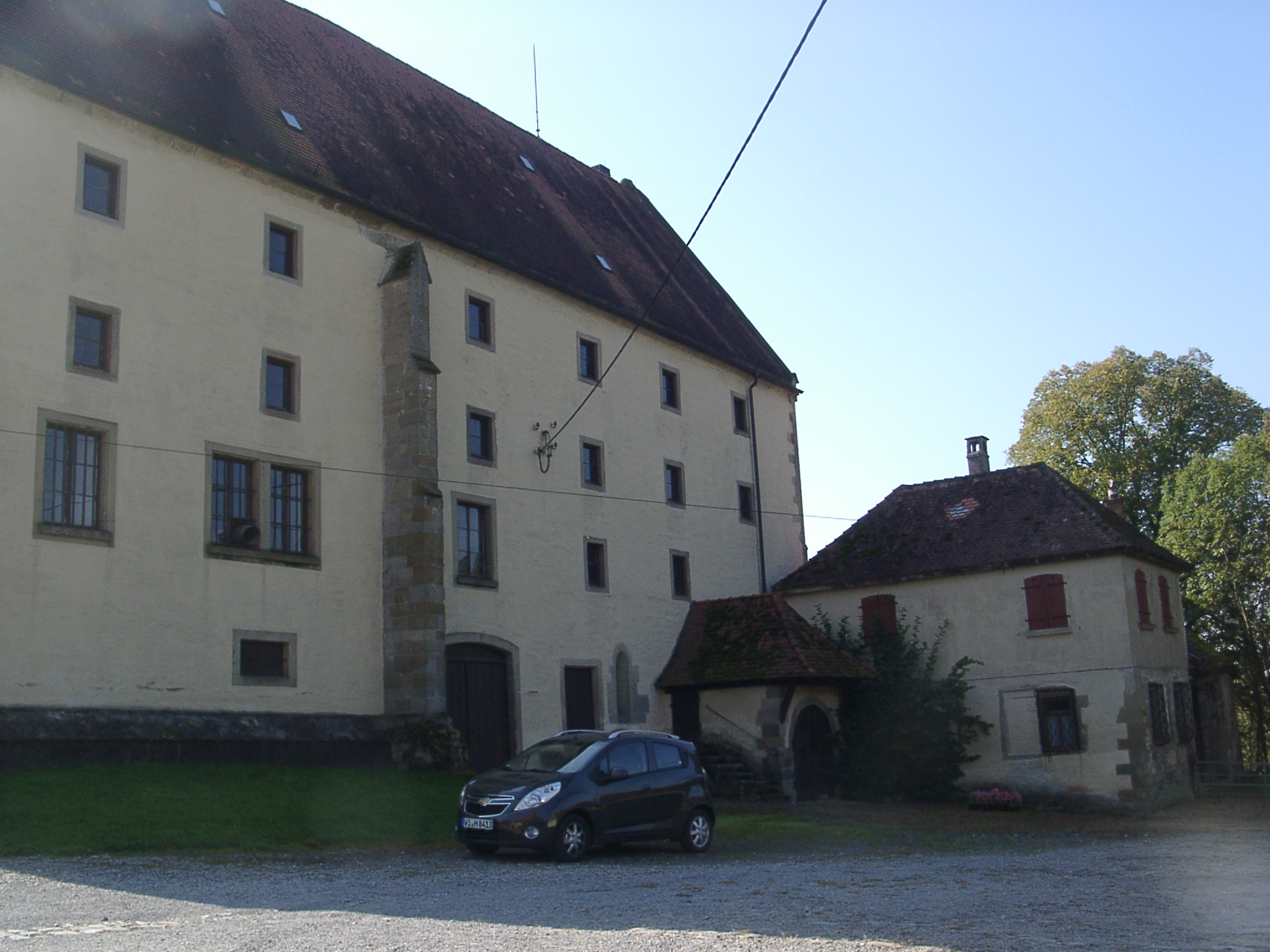 Kloster Rechentshofen